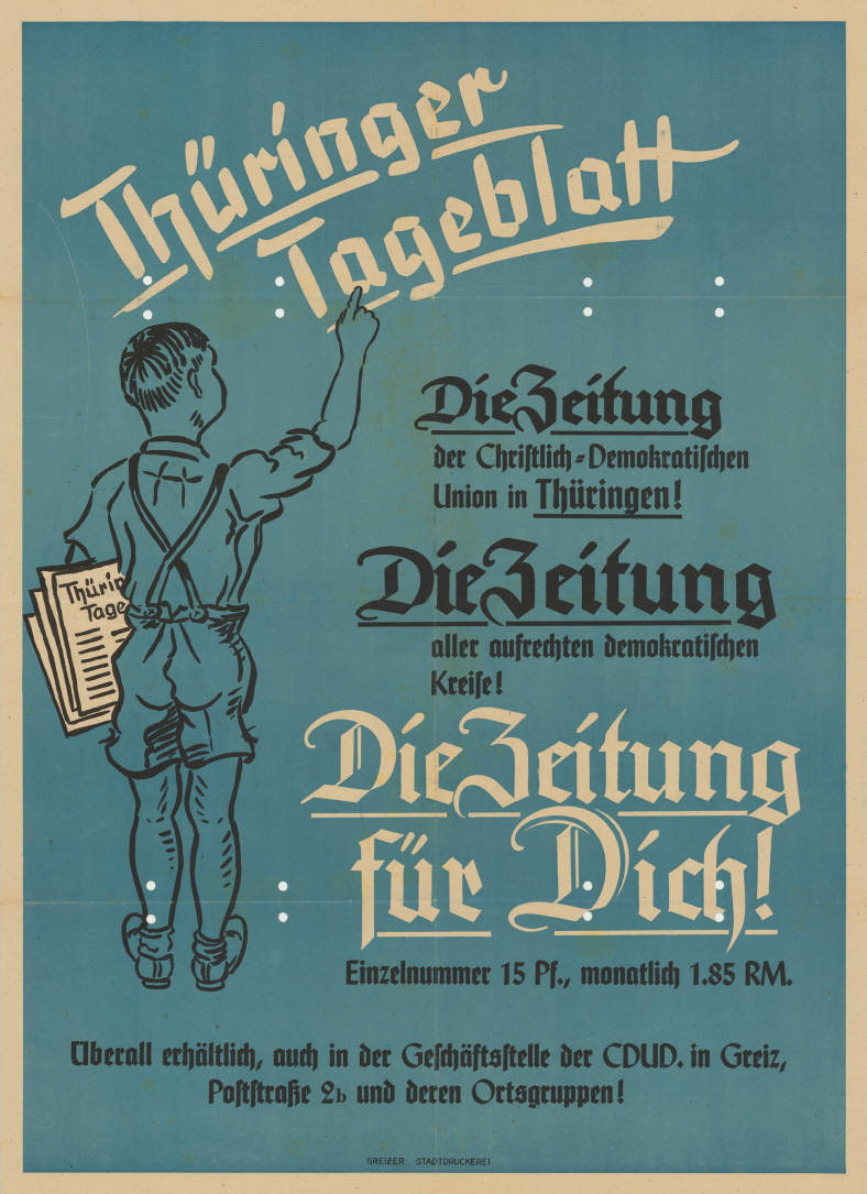 Thüringer Tageblatt Die Zeitung der Christlich-Demokratischen Union in Thüringen Die Zeitung aller aufrechten demokratischen Kreise! Die Zeitung für Dich! ... Abbildung: Zeitungsausträger (Grafik) Plakatart: Motiv-/Textplakat Drucker_Druckart_Druckort: Greizer Stadtdrucckerei Objekt-Signatur: 10-024 : 3044 Bestand: Plakate aus der SBZ/DDR (10-024) GliederungBestand10-18: Ost-CDU / CDUD / Exil-CDU Lizenz: KAS/ACDP 10-024 : 3044 CC-BY-SA 3.0 DE